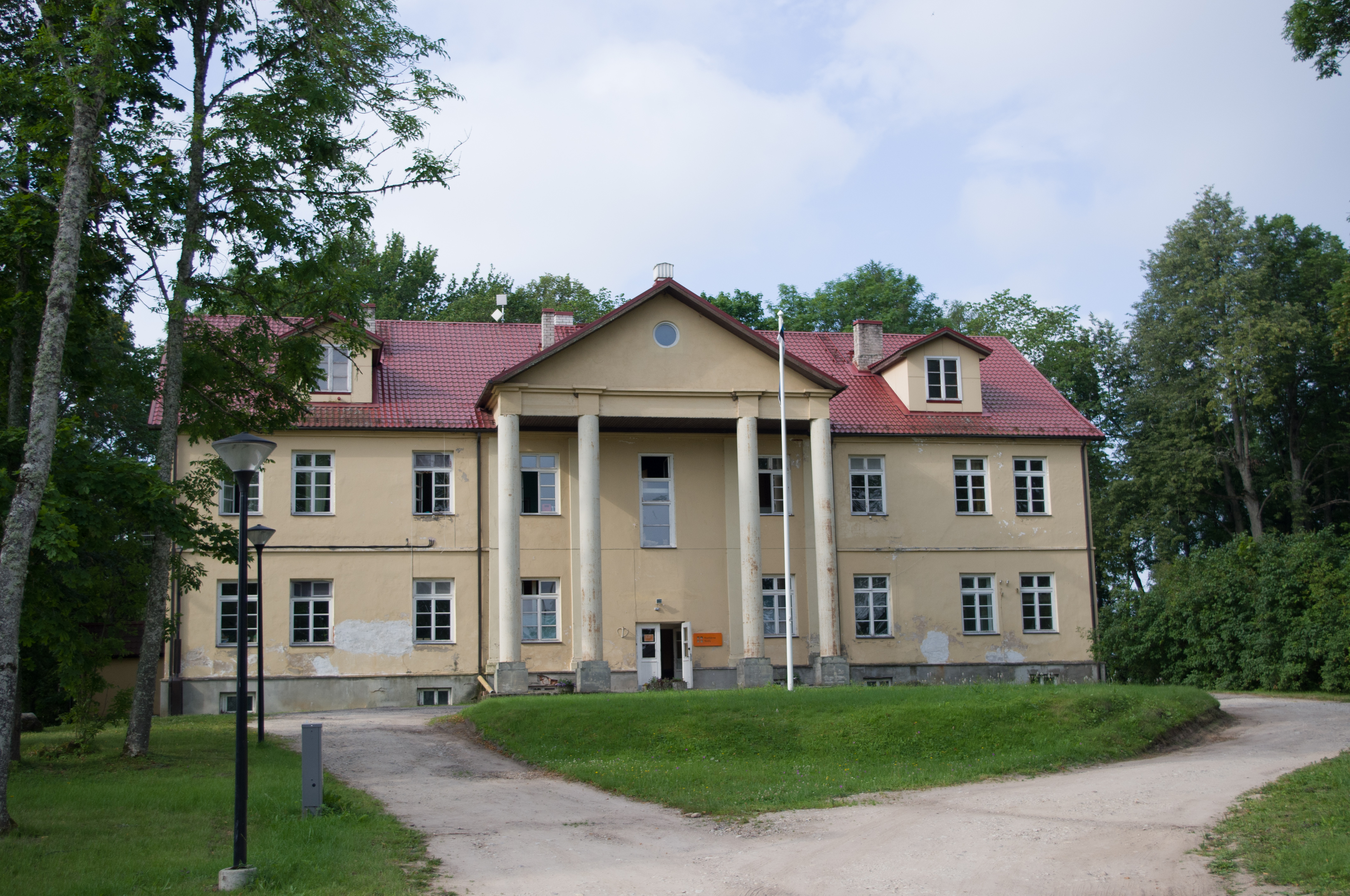 Kodijärve mõis, 2014